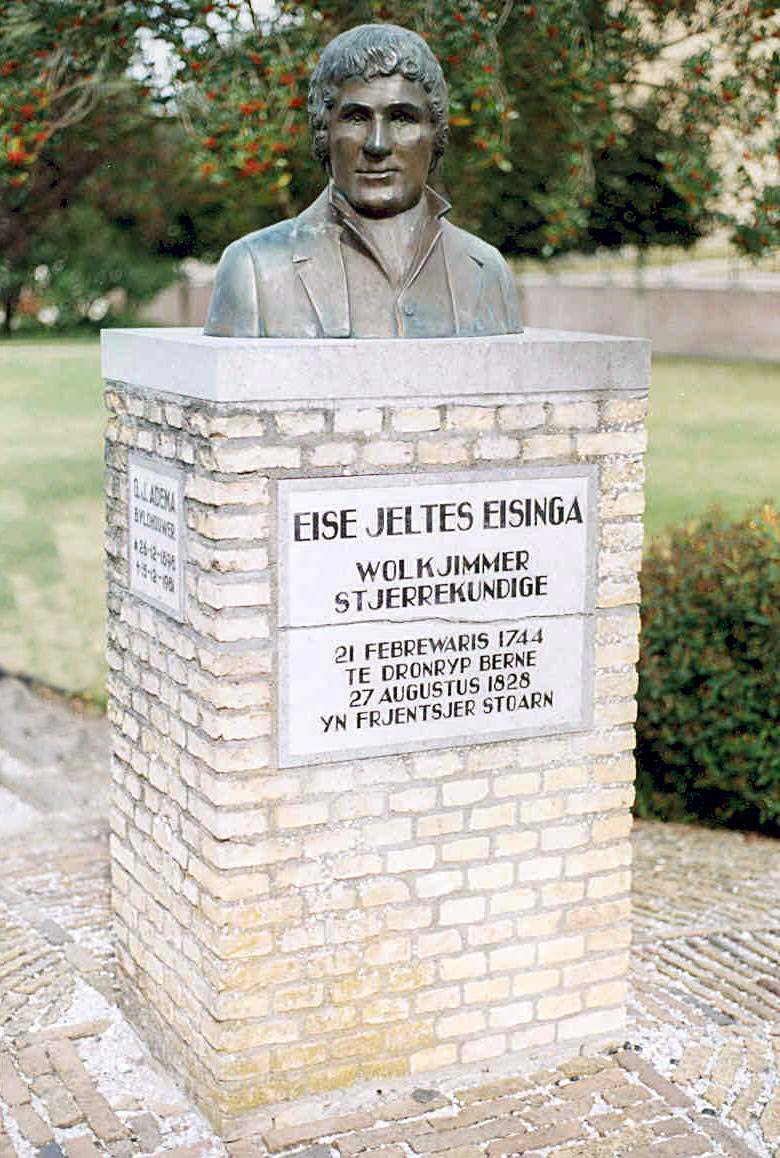 G.J.Adema, 1982